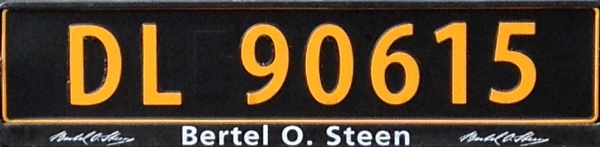 Skilt for anleggskjøretøy. Vanlig syn på flyplasser.